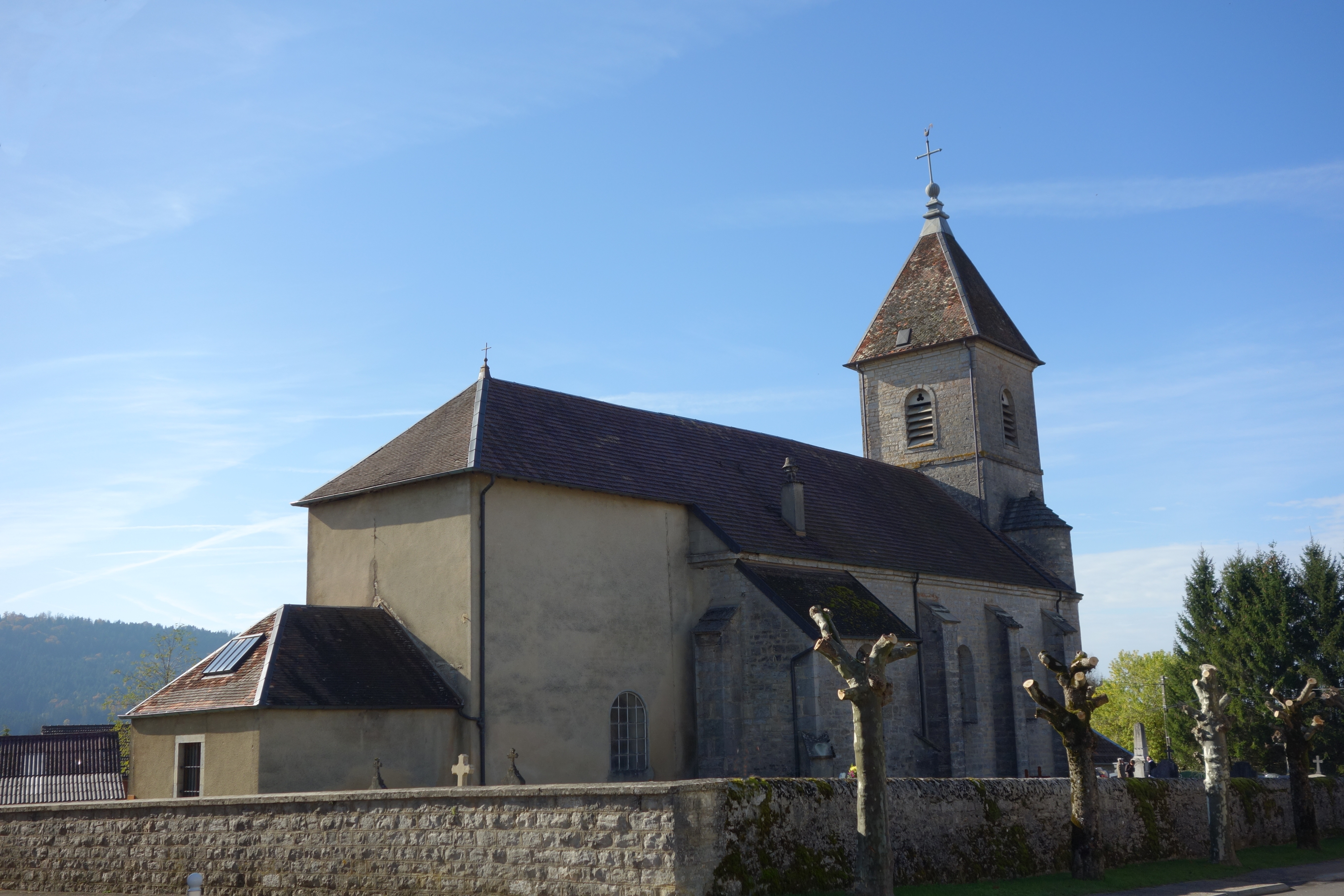 Saint-Germain-en-Montagne (Jura) - église